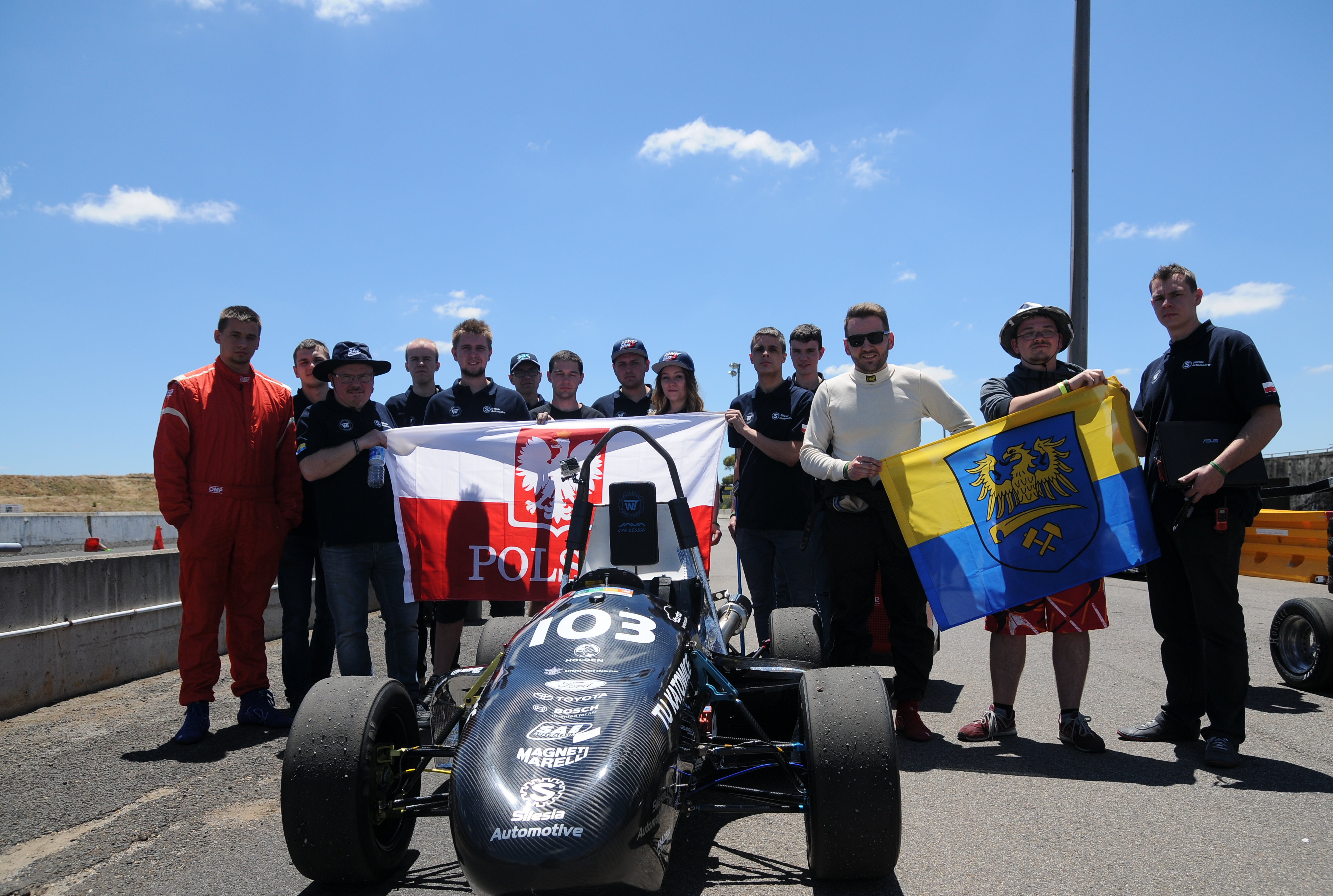 Silesia Automotive podczas zawodów w australijskim Melbourne